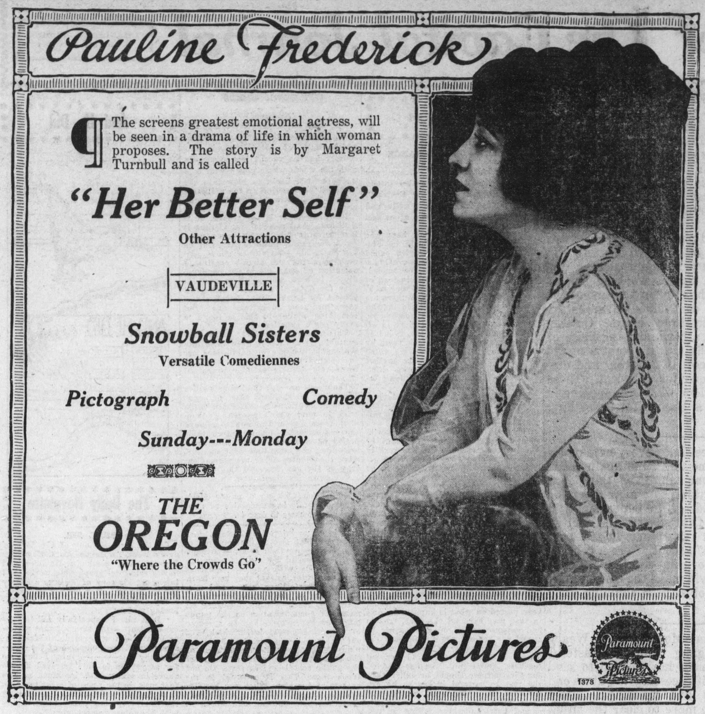 Newspaper advertisement for Her Better Self